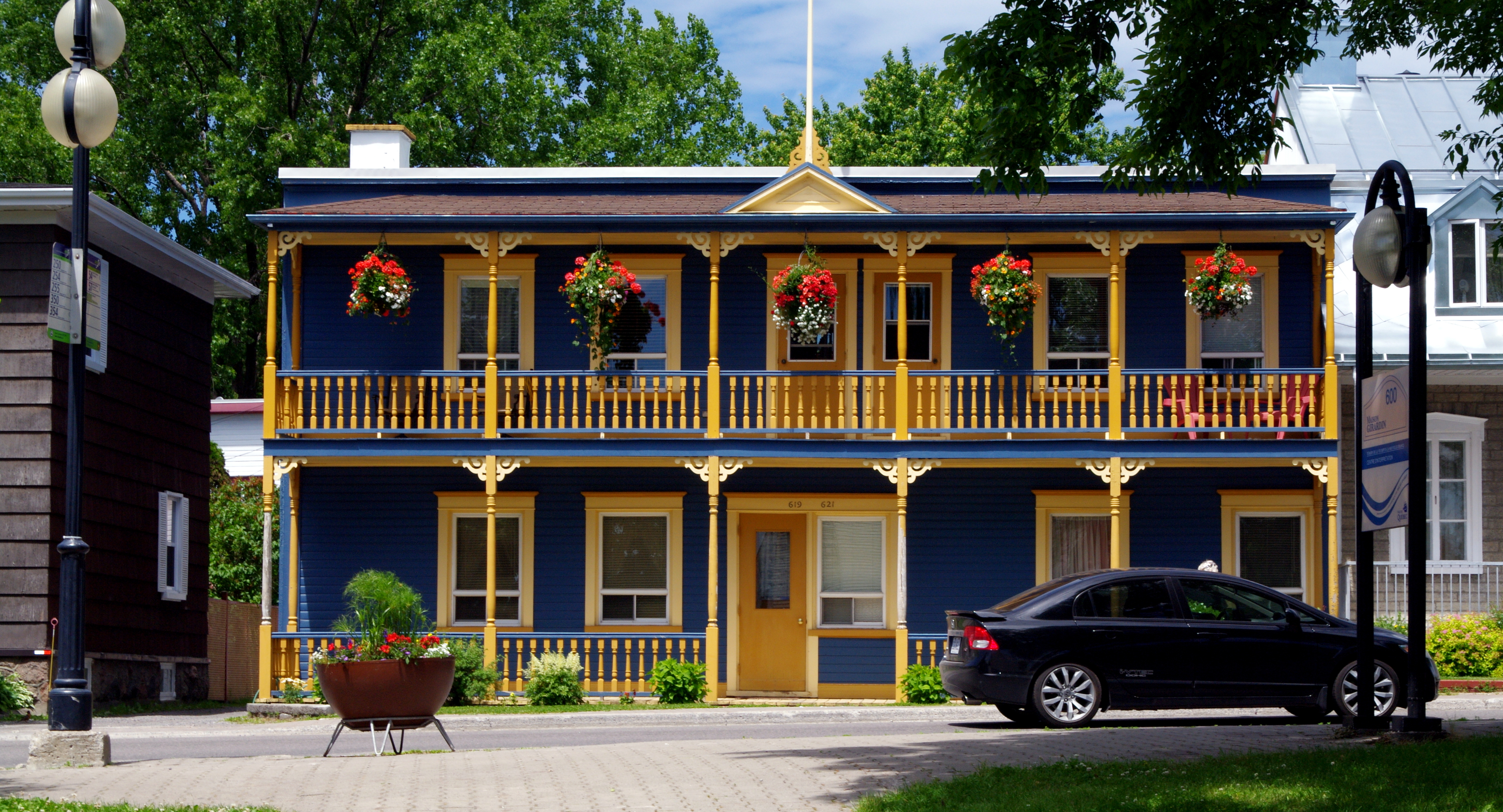 Image de la ville de Québec provenant du concours Wikipédia prend Québec.